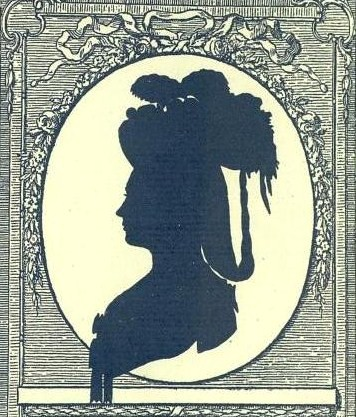 Баронесса Софья Ивановна Эльмпт, фрейлина, замужем за генерал-поручиком П. И. Турчаниновым.